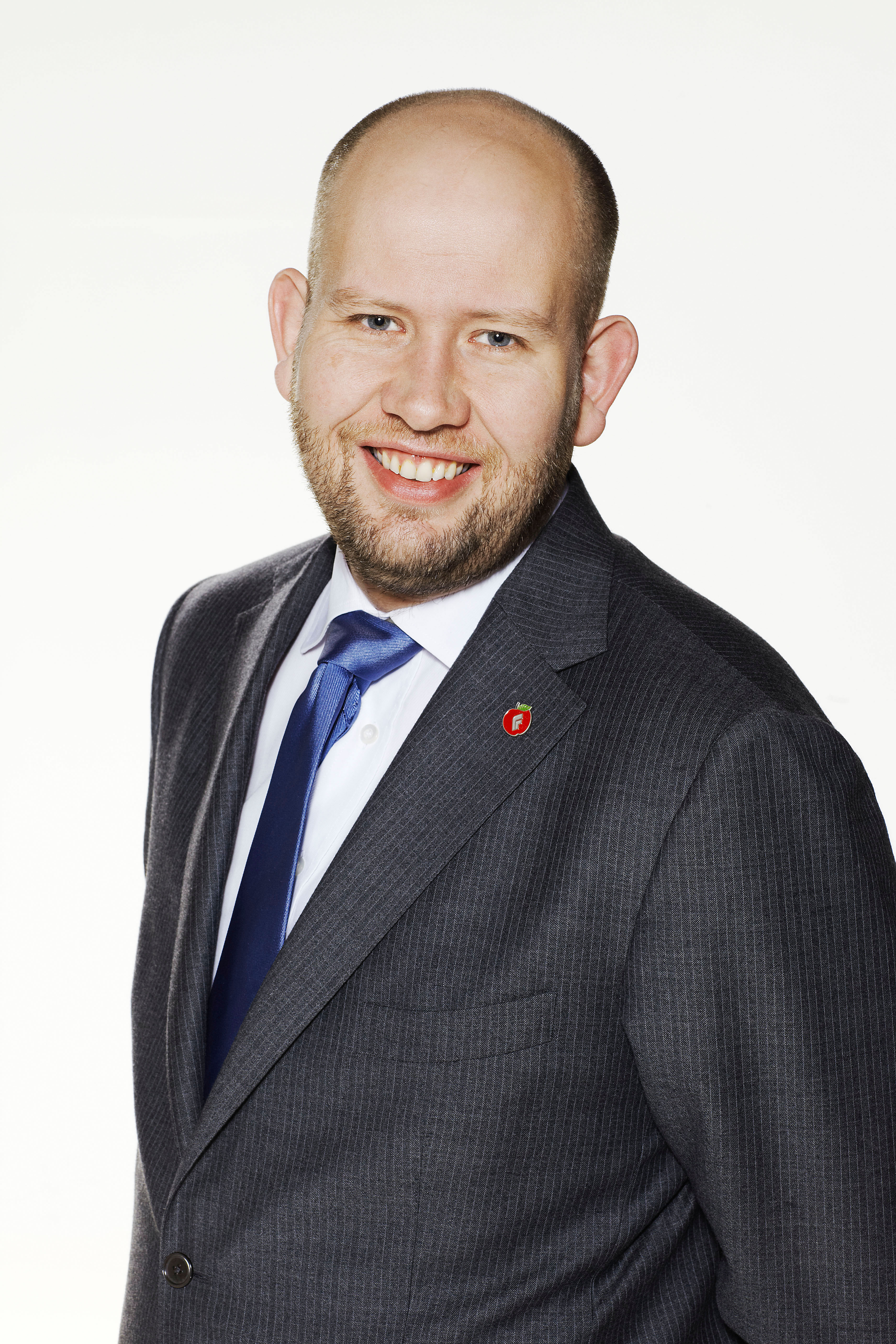 Tord Lien valgkampbilder for Stortingsvalgkampen 2009